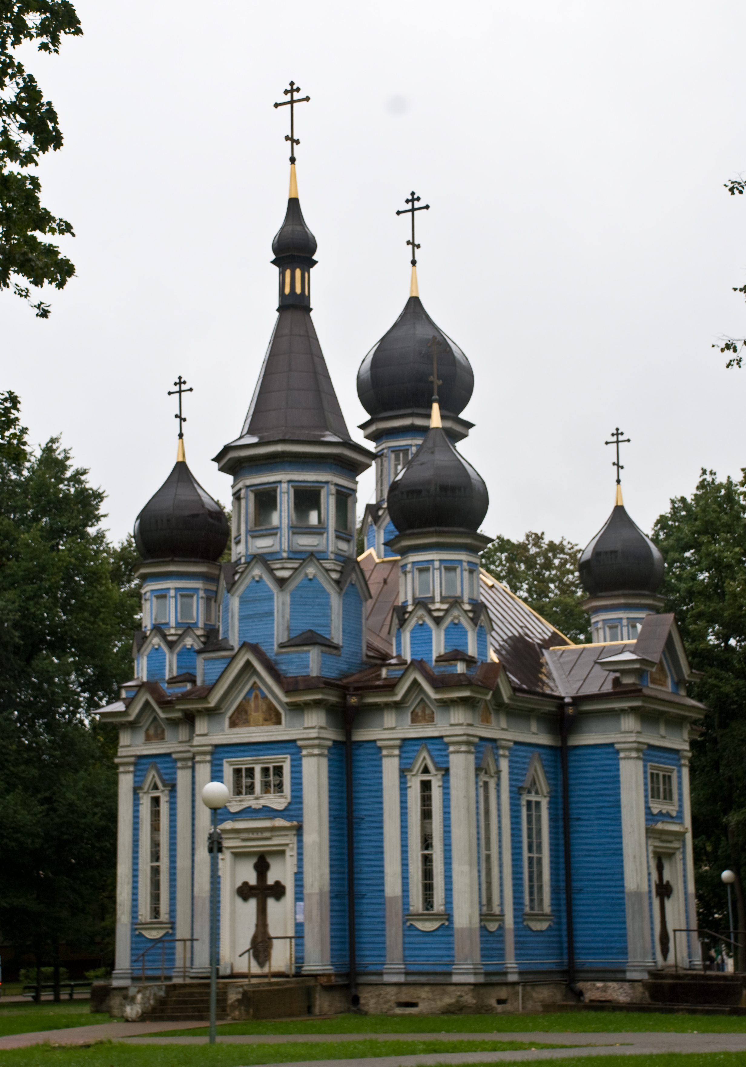 Russian Orthodox church, Druskininkai, 13 Sept. 2008